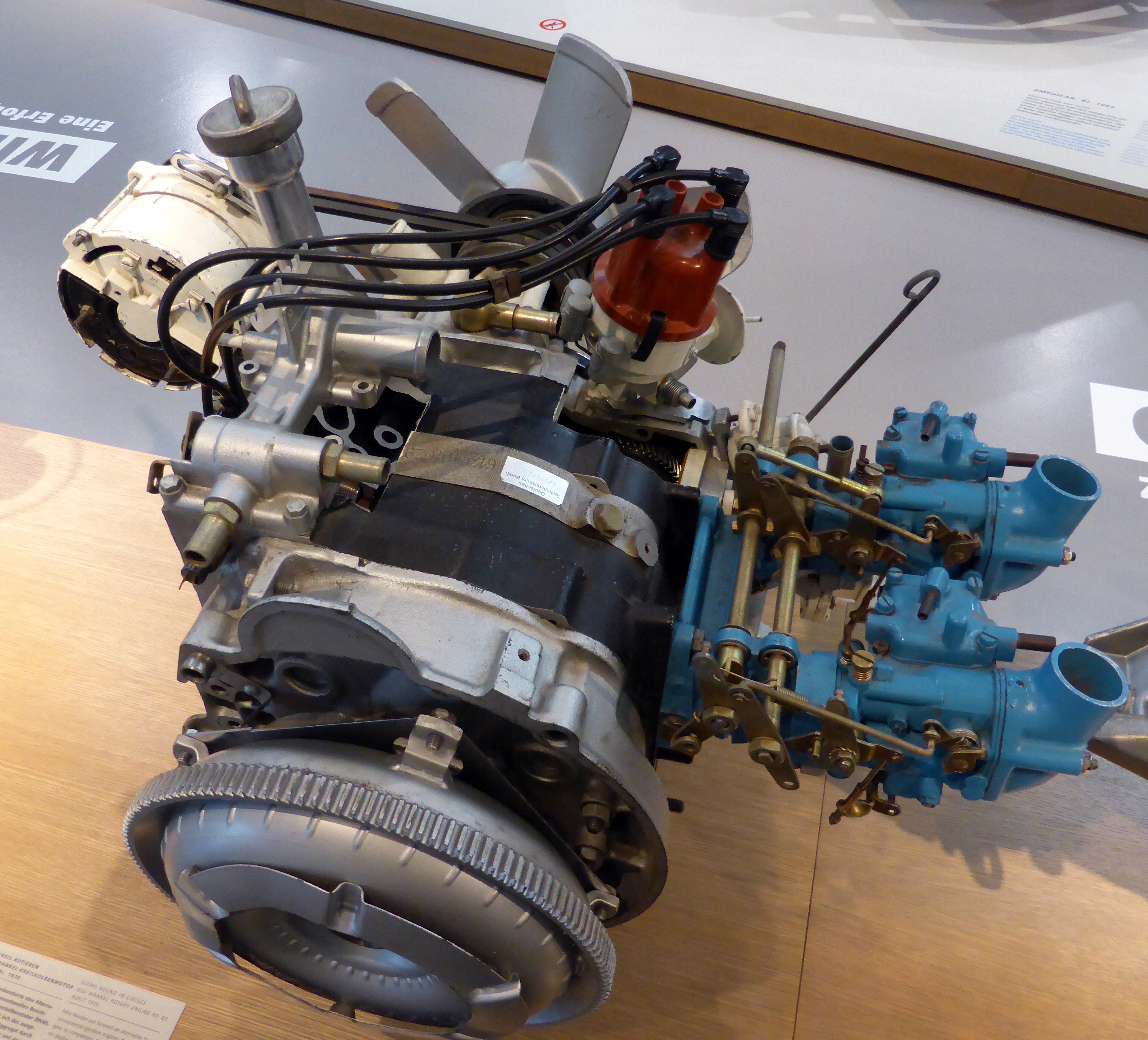 Wankelmotor eines NSU Ro 80, Baujahr 1970 (Rotationskolbenmotor). Ausgestellt im Deutschen Technikmuseum Berlin. Wikipedianische KulTour am 10. Oktober 2015 in der Ausstellung des Museums.